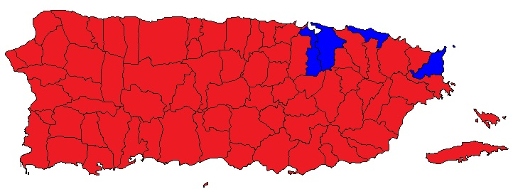 Alcaldes Electos en Elecciones Generales de 1972